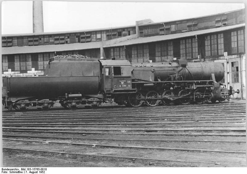 Dampflok 52 3588 (BR 52) Zentralbild Schmidtke 7.8.1952 Lokomotivtypen der Deutschen Reichsbahn. UBz: Baureihe 52